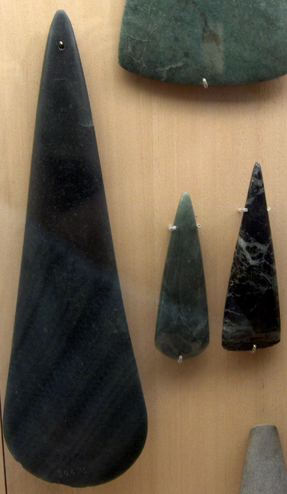 Haches cérémonielles, pierre verte polie, néolithique, musée des antiquités nationales, Saint-Germain-en-Laye.